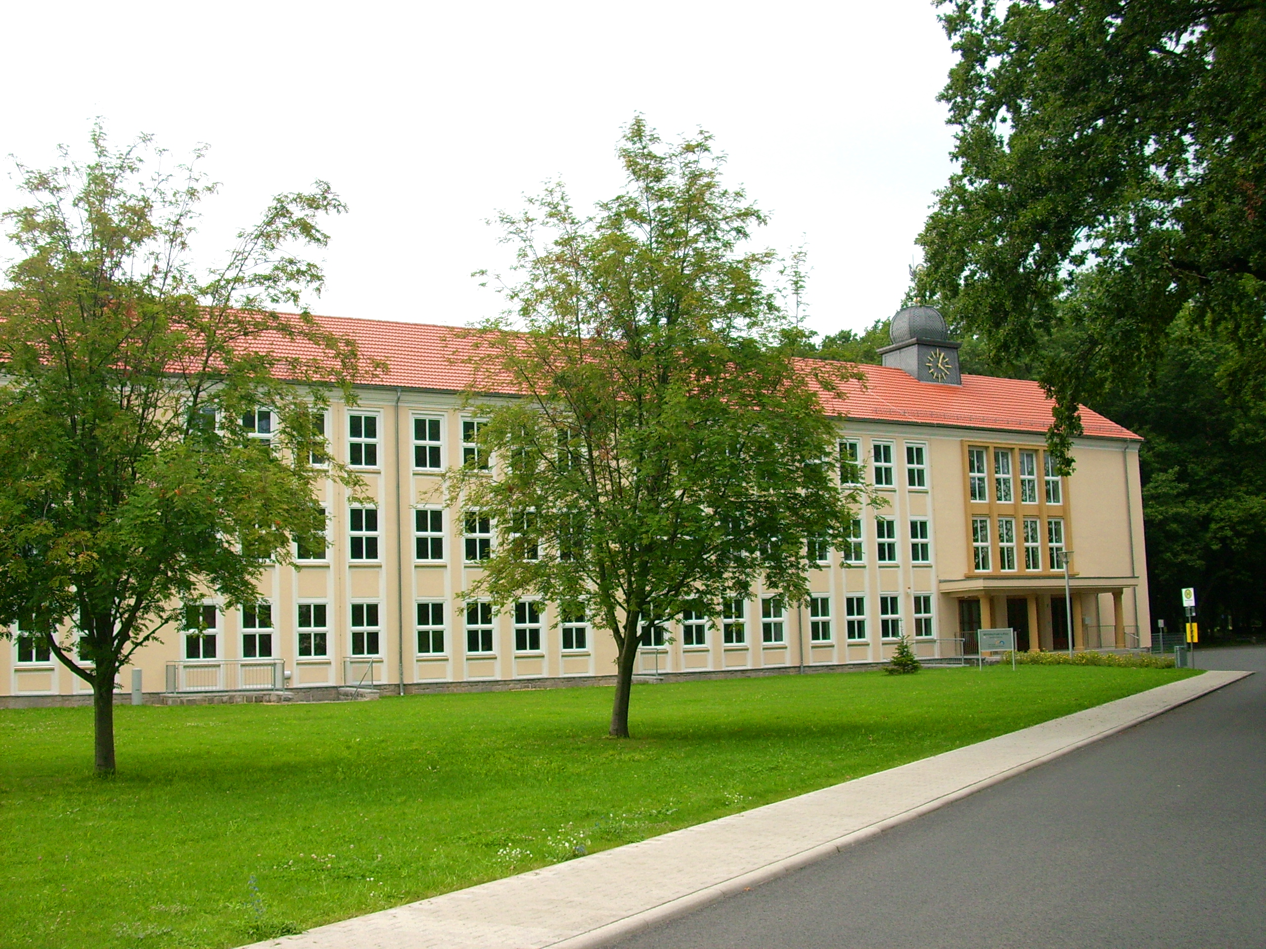 Mittelschule in Lohsa